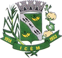 Brasão da cidade de Icém, SP